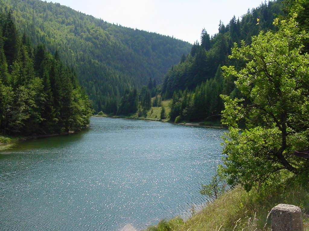 Palcmanska masa dam on river Hnilec